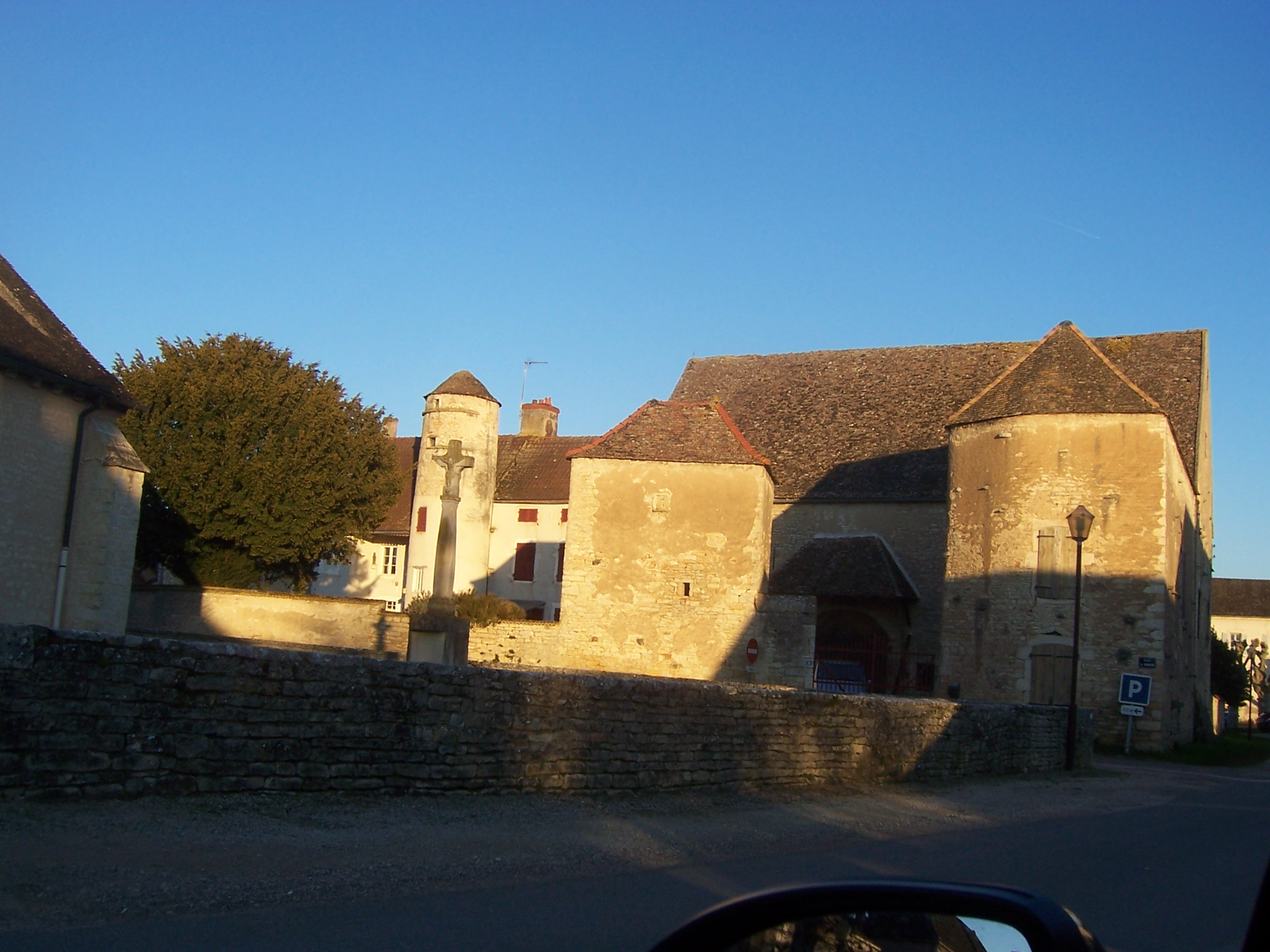 Chaudenay